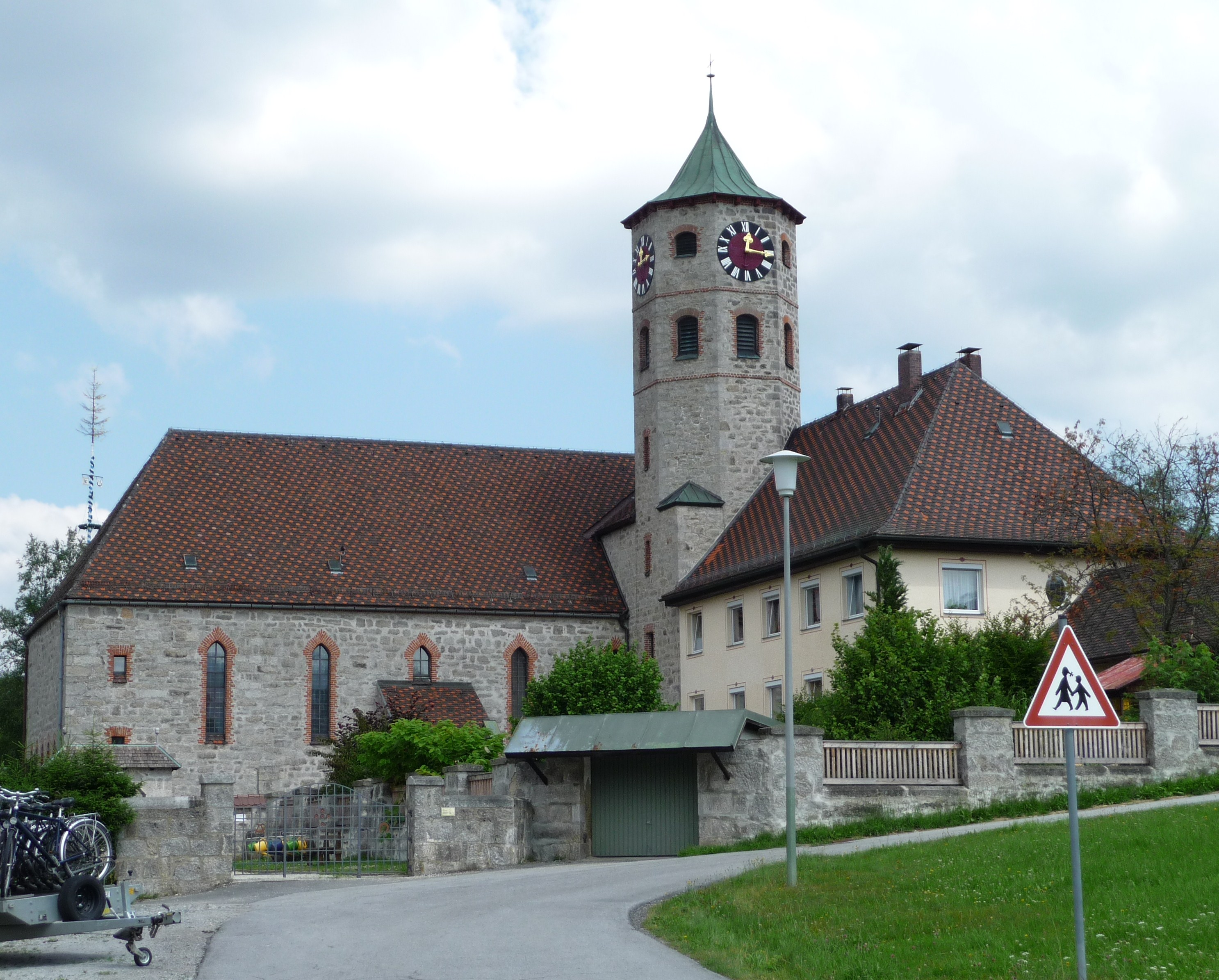 Pfarrkirche St. Maximilian in Haidmühle